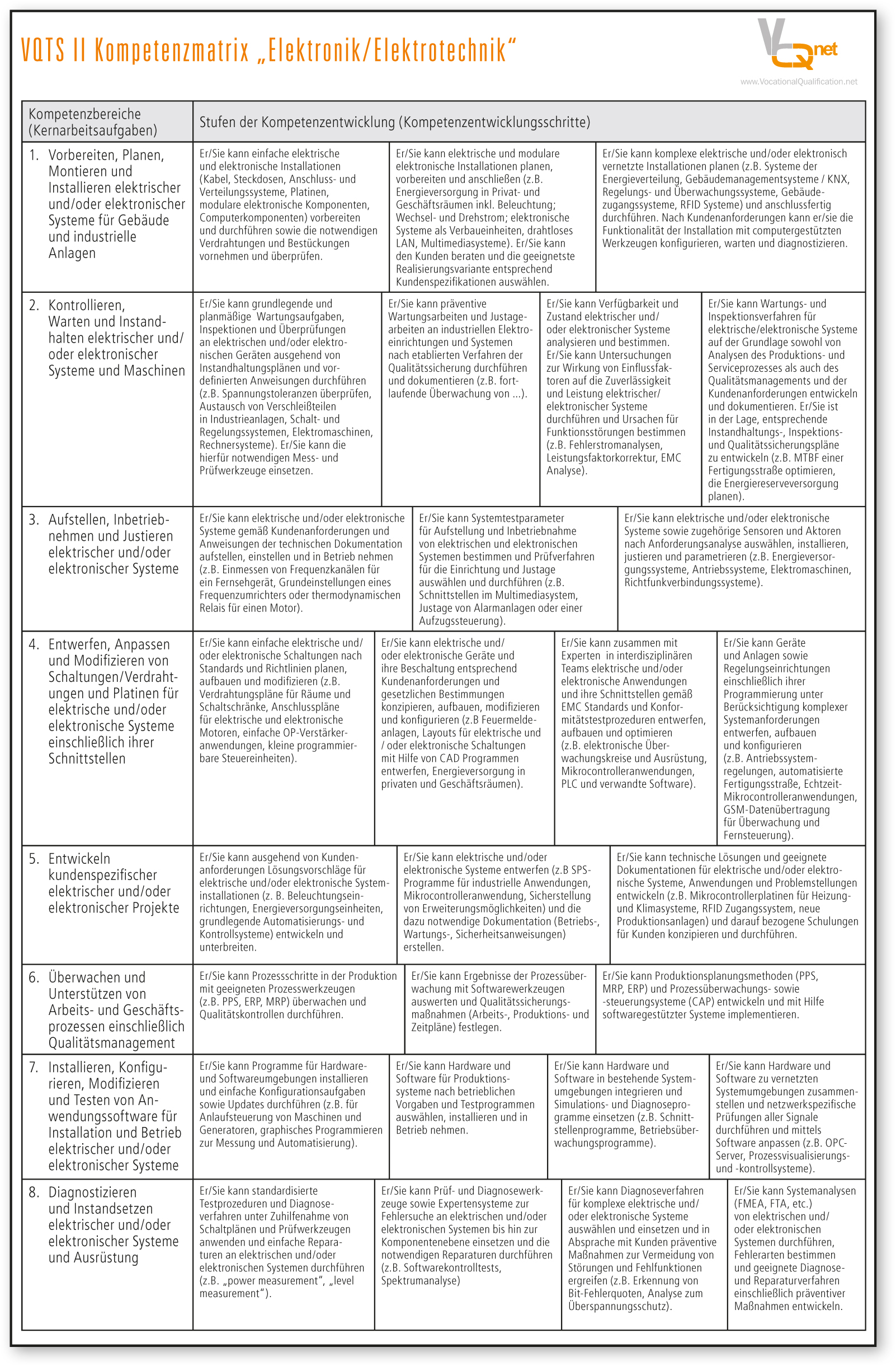 VQTS Matrix Elektronik